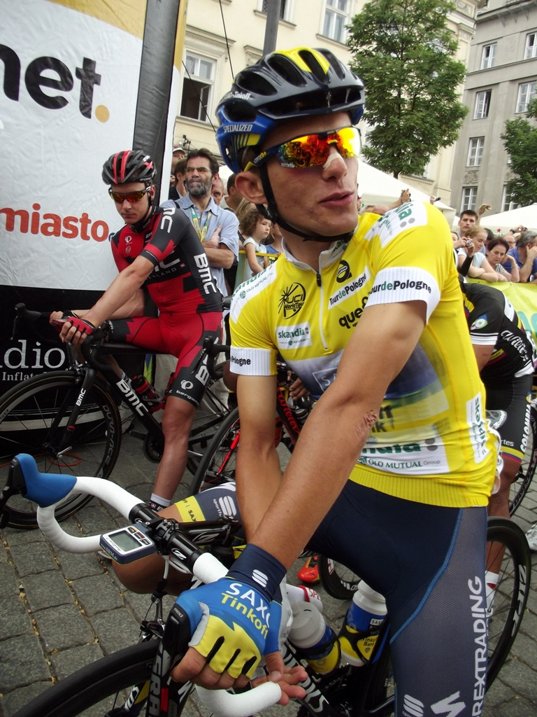 Zdjęcie zrobione podczas III etapu 70. jubileuszowego Tour de Pologne w Krakowie.